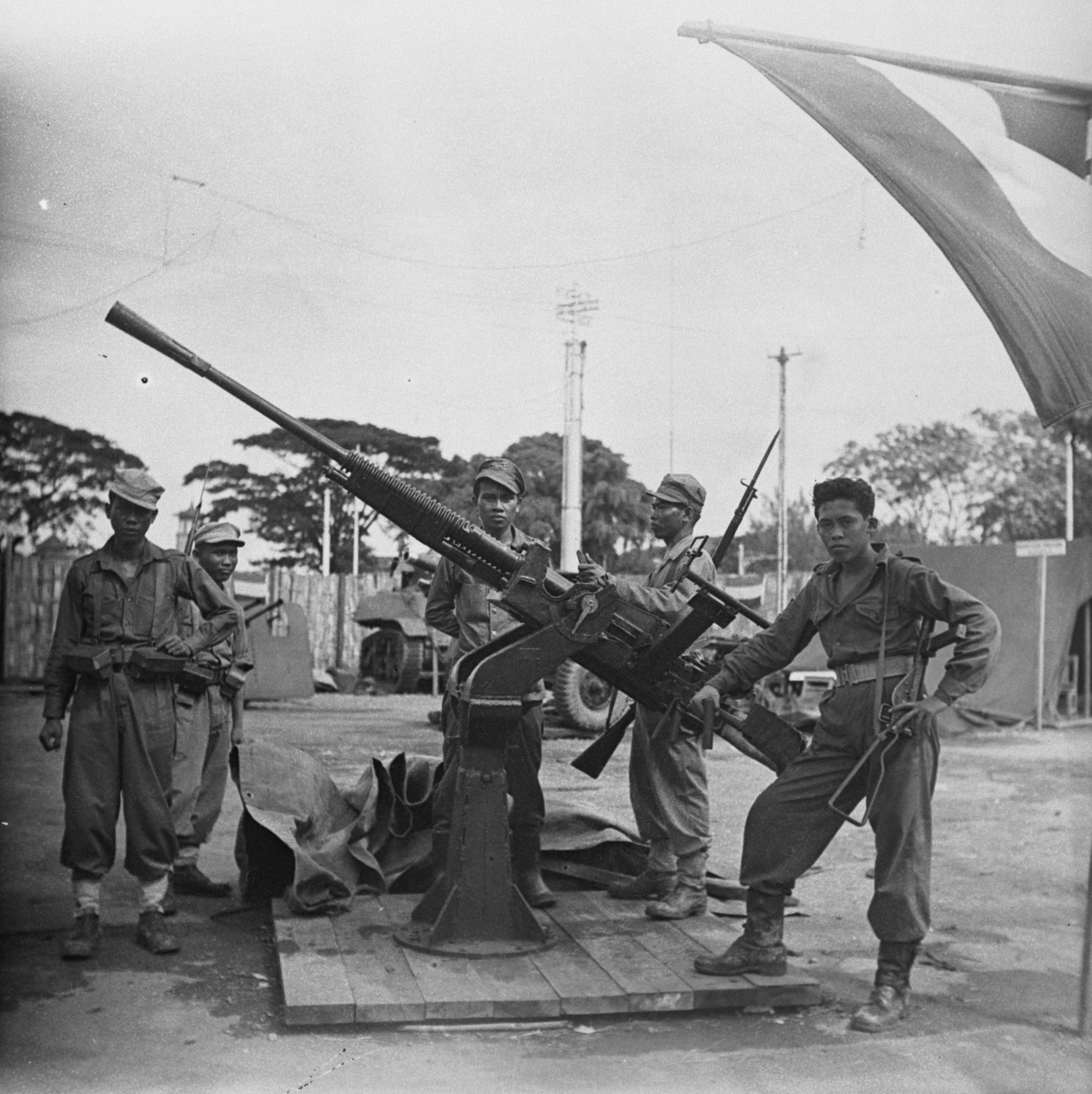 Collectie / Archief : Fotocollectie Dienst voor Legercontacten Indonesië Reportage / Serie : [DLC] A-Divisie Soerabaja [presentatie van wapens en voertuigen] Beschrijving : KNIL-militairen poseren bij afweergeschut Datum : maart 1947 Locatie : Indonesië, Nederlands-Indië Fotograaf : Fotograaf Onbekend / DLC Auteursrechthebbende : Nationaal Archief Materiaalsoort : Negatief (zwart/wit) Nummer archiefinventaris : bekijk toegang 2.24.04.03 Bestanddeelnummer : 10979